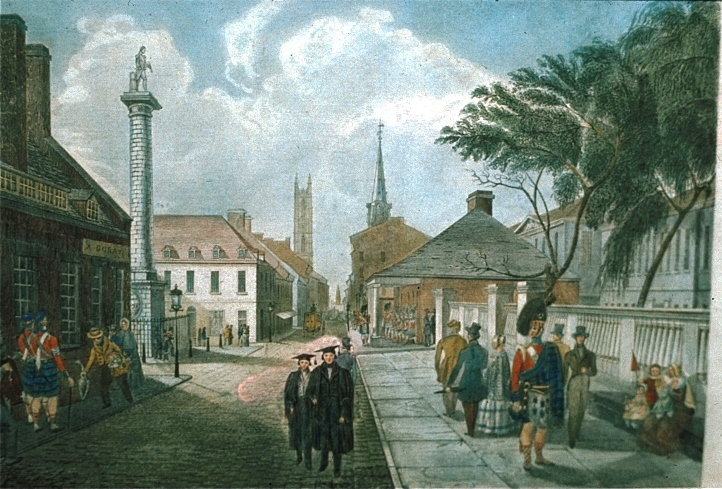 Estampe, Vue Nord-Est de la rue Notre-Dame, Montréal, Encre et aquarelle sur papier, 23 x 26 cm Dessin de Sproule Maison Antoine-Mallard, 174-176, rue Notre-Dame Est / 462, place Jacques-Cartier « Réalisé 12 ans plus tard que celui de Sproule, ce dessin de Murray montre une fenêtre plus large que celles de l'étage au-dessus. Dessin plus juste à cet égard que celui de Sproule? Ou fenêtre agrandie avant 1842? » —